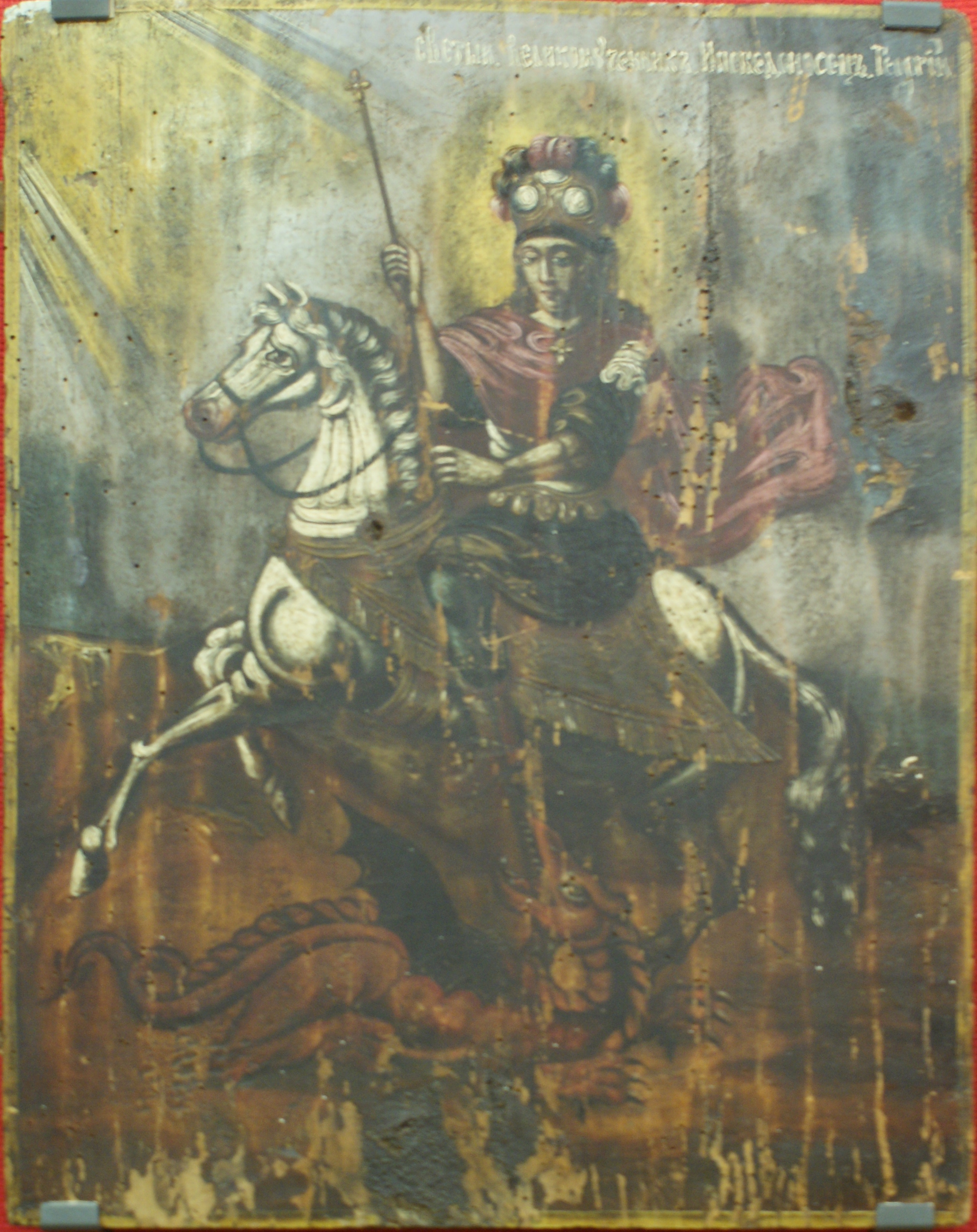 Цуд Георгія аб змеі. Дрэва, алей. Чачэрскі гісторыка-культурны музей